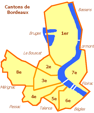 Découpage administratif des 8 cantons de la ville de Bordeaux